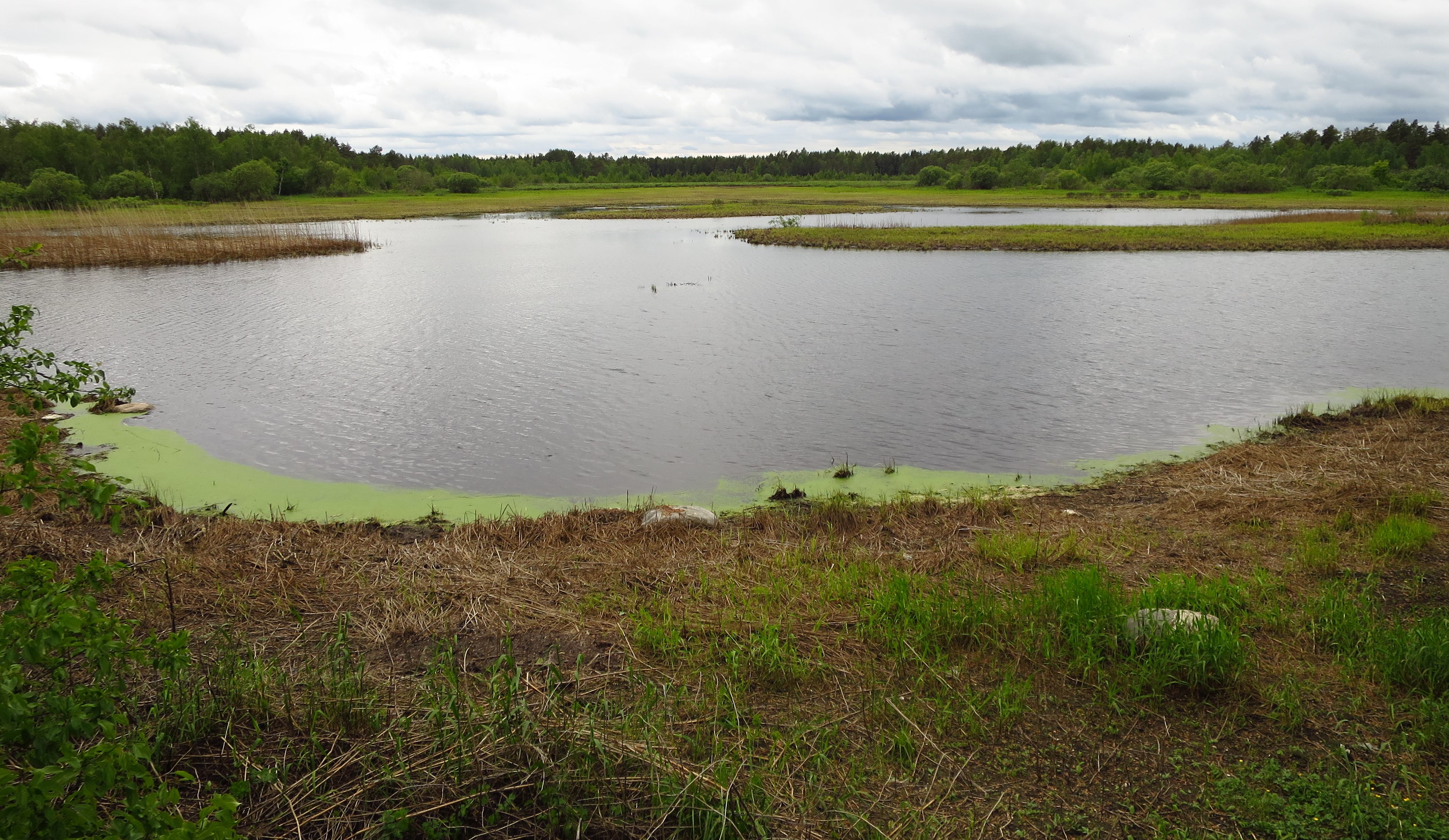 Savalduma karstijärvik